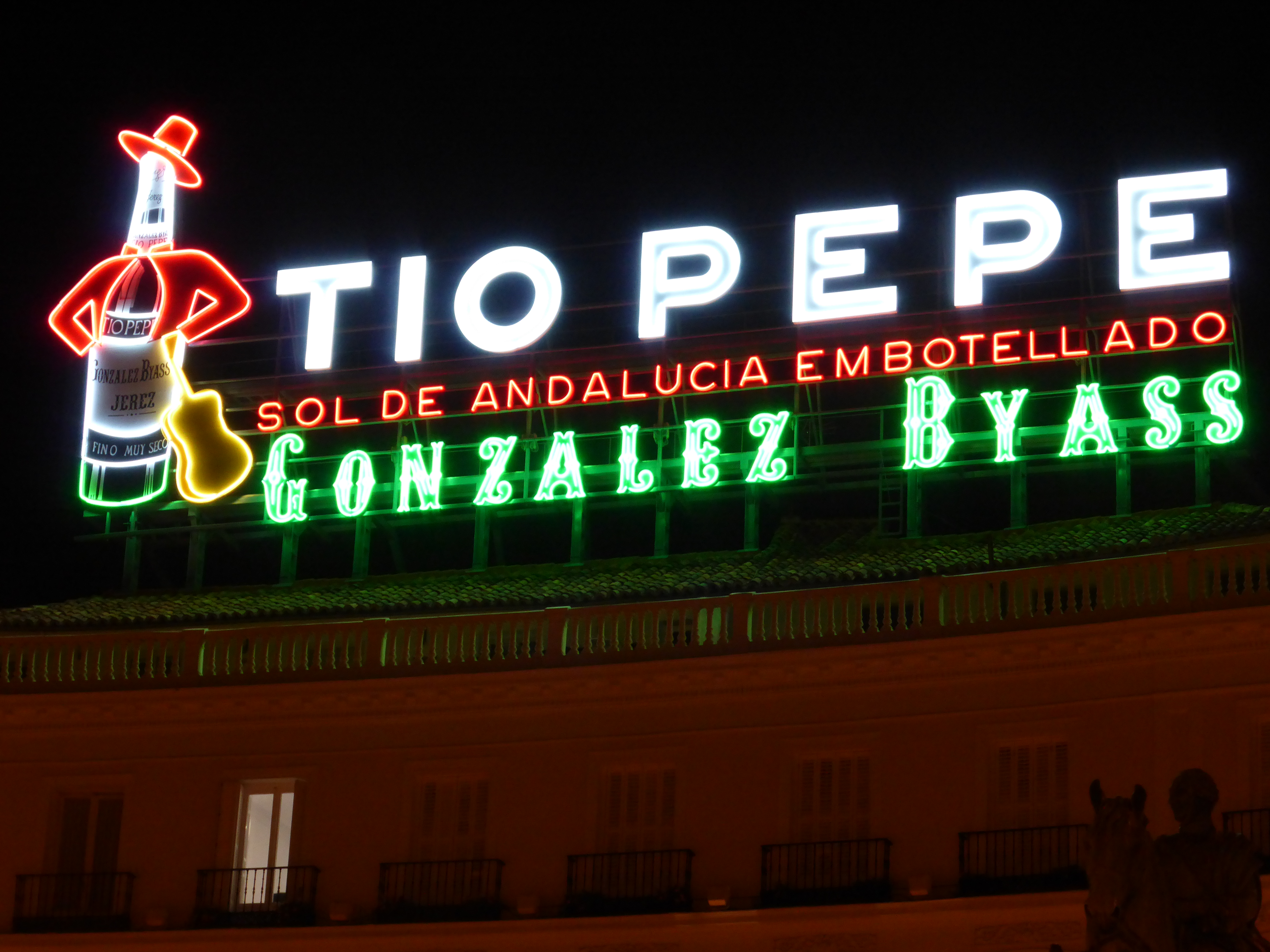 En la céntrica plaza madrileña llamada "Puerta del Sol", se ha repuesto el tradicional anuncio "Tío Pepe. Sol de Andalucía embotellado". Es el único gran anuncio luminoso que existe actualmente, sobre edificios de esta plaza.